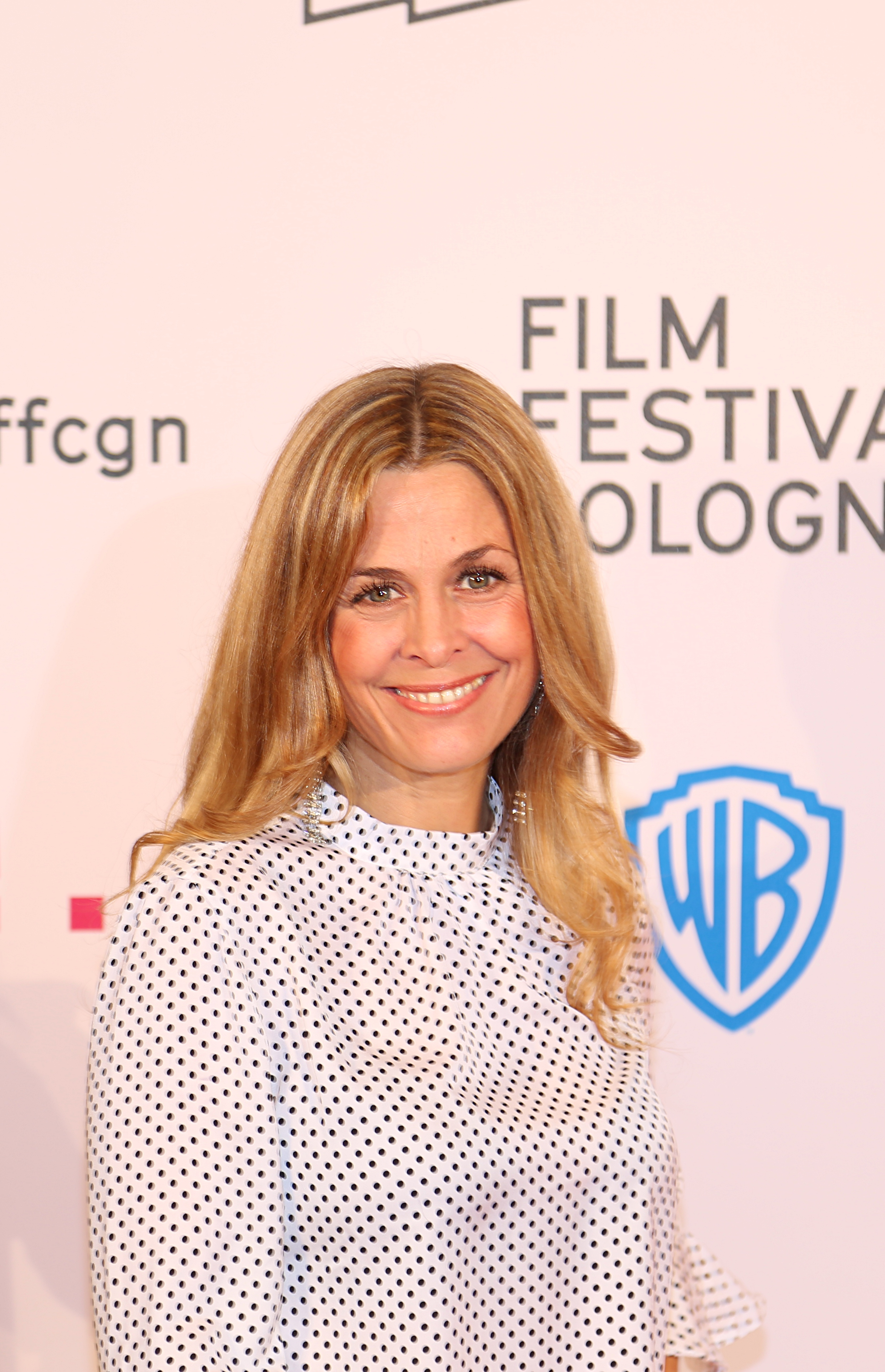 Tanja Lanäus bei der Verleihung der "Film Festival Cologne Awards 2017".